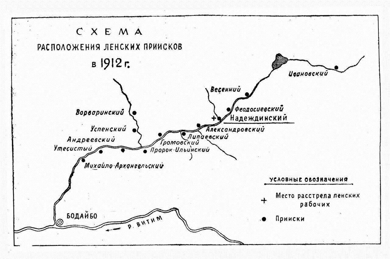 Layout of the Lena's Goldfields., Ltd. mines. 1912